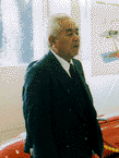 Minister Hisao Horinouchi.